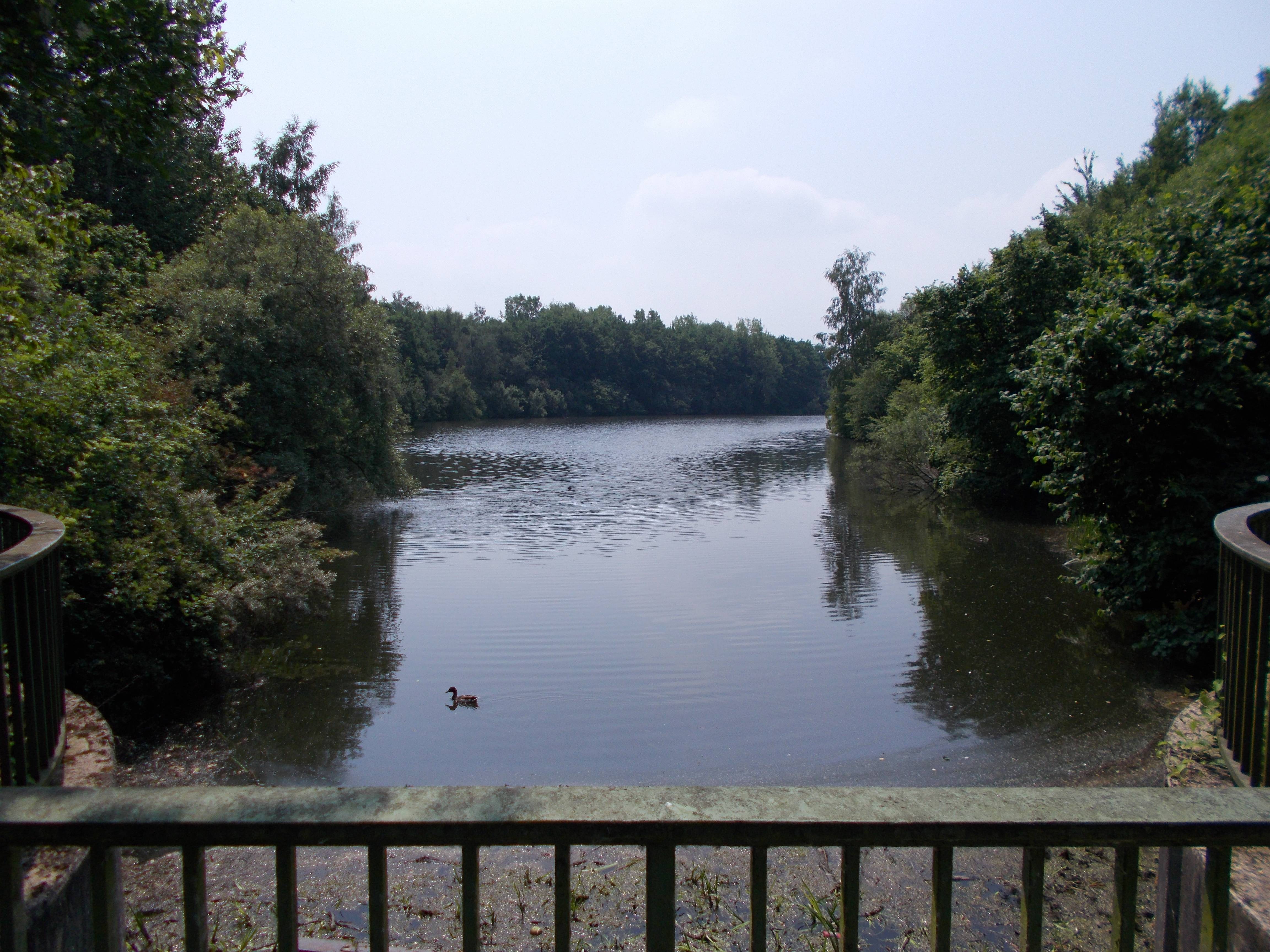 Stauwehr über den Kasterer See.